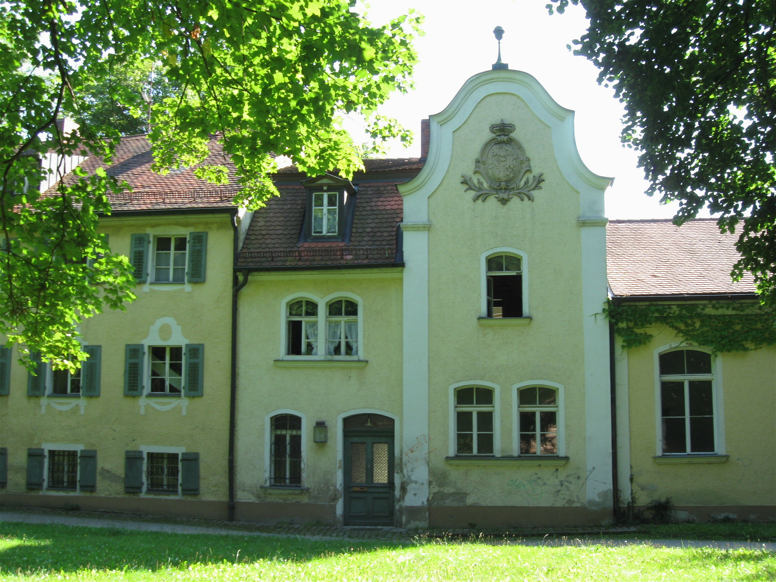 Albertstraße 1; Ehem. Kaffeehaus Prinzengarten und ehem. fürstliche Lingerie, 1911 eingerichtet, dreigeschossiger und traufständiger Satteldachbau mit Putzverzierungen, nach Westen ein- und zweigeschossige Anbauten mit geschweiftem neubarockem Zwerchgiebel, im Kern 18. Jh., Anbauten 1870 und 1894; an der Fassade Wappenrelief Thurn und Taxis